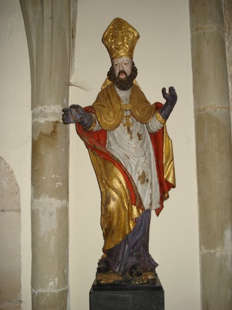 Statue de Saint Basle dans l'église de Vittel